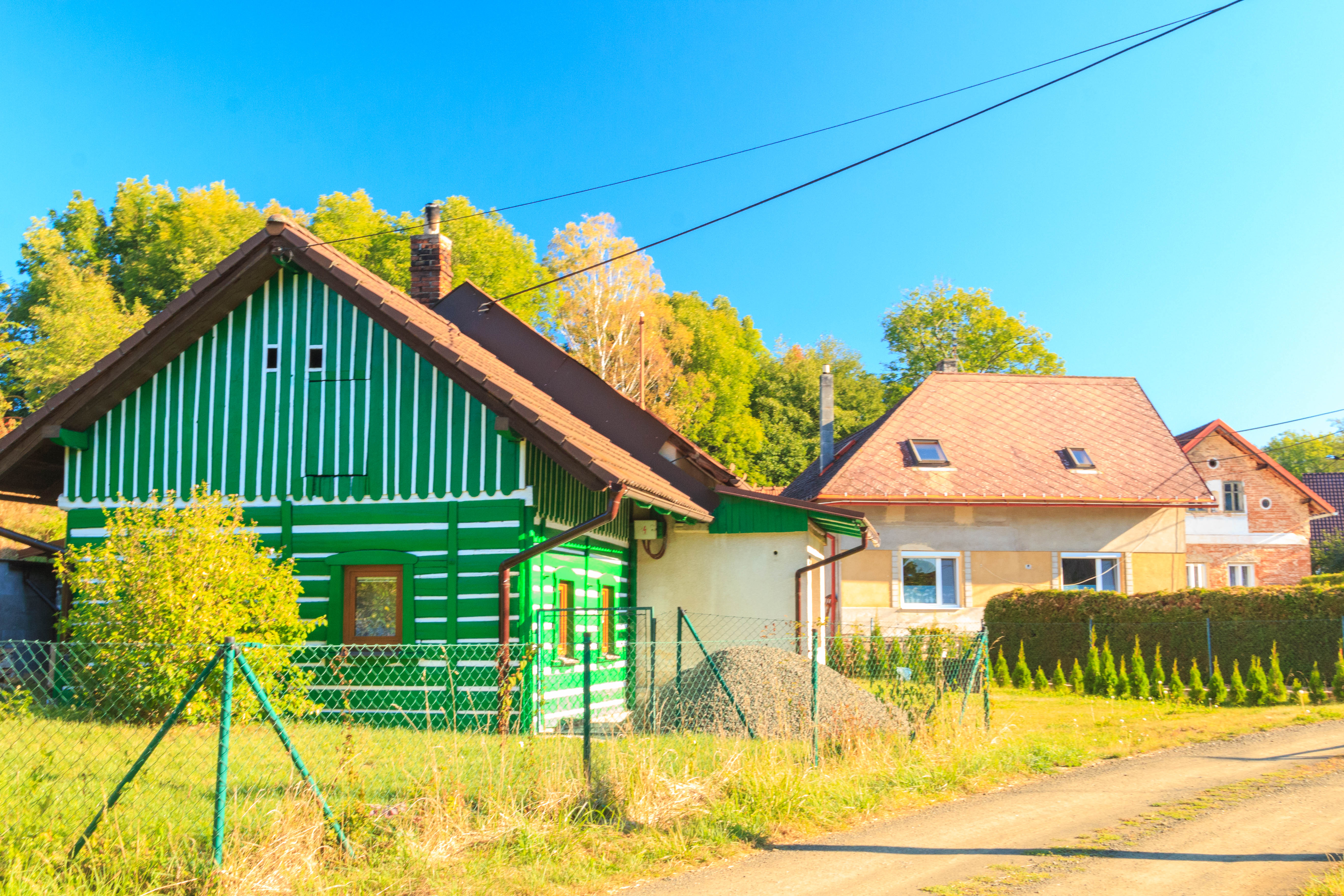 Jivany u Libuně - čp. 21